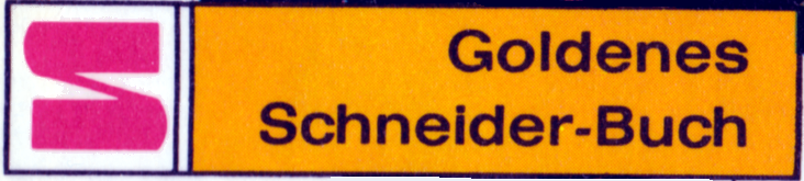 Logo eines Goldenen-Schneider-Buchs (Franz Schneider Verlag) vor 1985, 6x1,3 cm